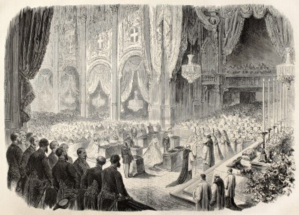 Matrimonio di Margherita e Umberto di Savoia